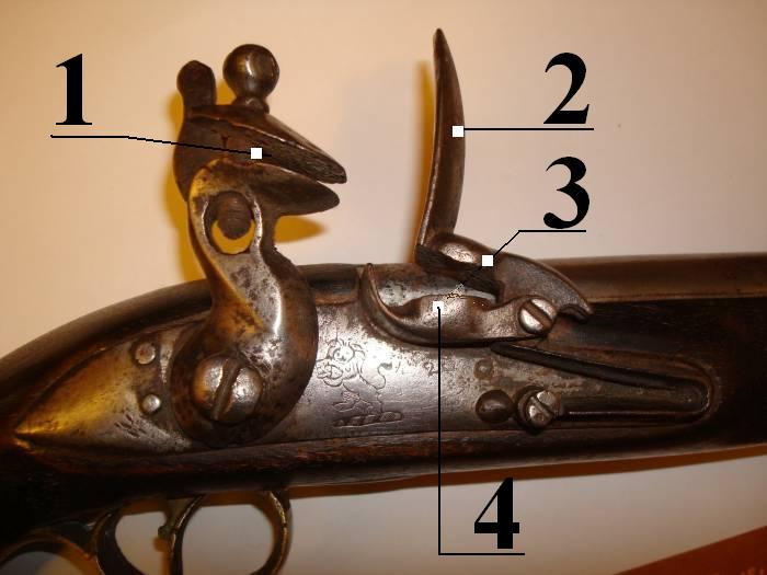 Photo d'une platine de percussion à silex d'arme à feu ancienne.